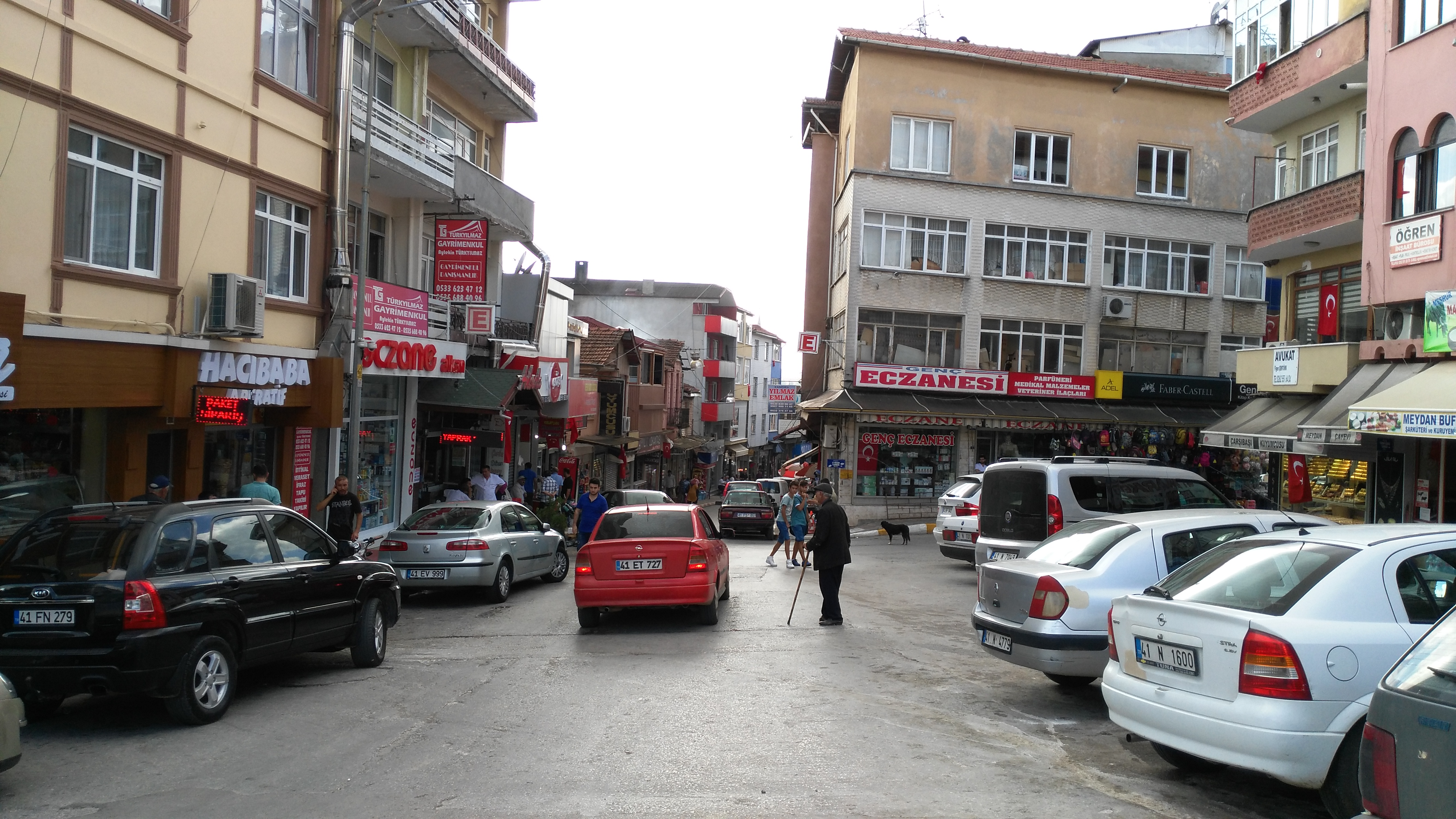 kandıra merkezden bir görünüm.